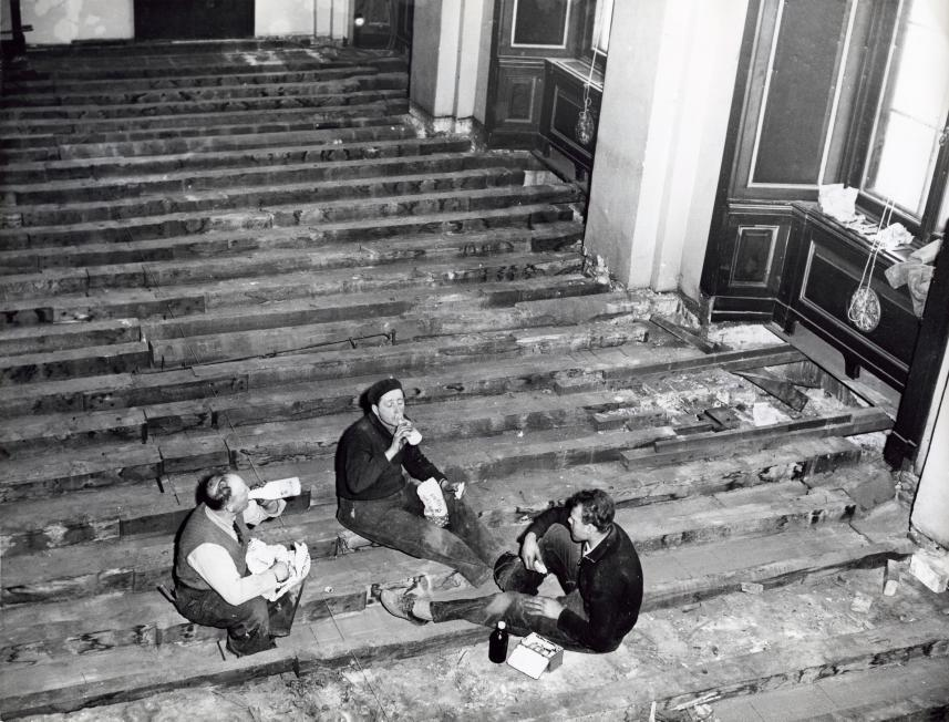 Den Haag (Nederland) De verbouwing van het gebouw van de Eerste Kamer. Werklieden houden thans zitting in de Eerste Kamer, terwijl de Eerste Kamerleden in de Ridderzaal vergaderen. De werklieden houden pauze en eten hun brood en drinken uit een flesje. 3